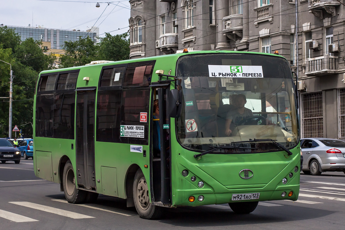 Mudan MD 6750 Hopper